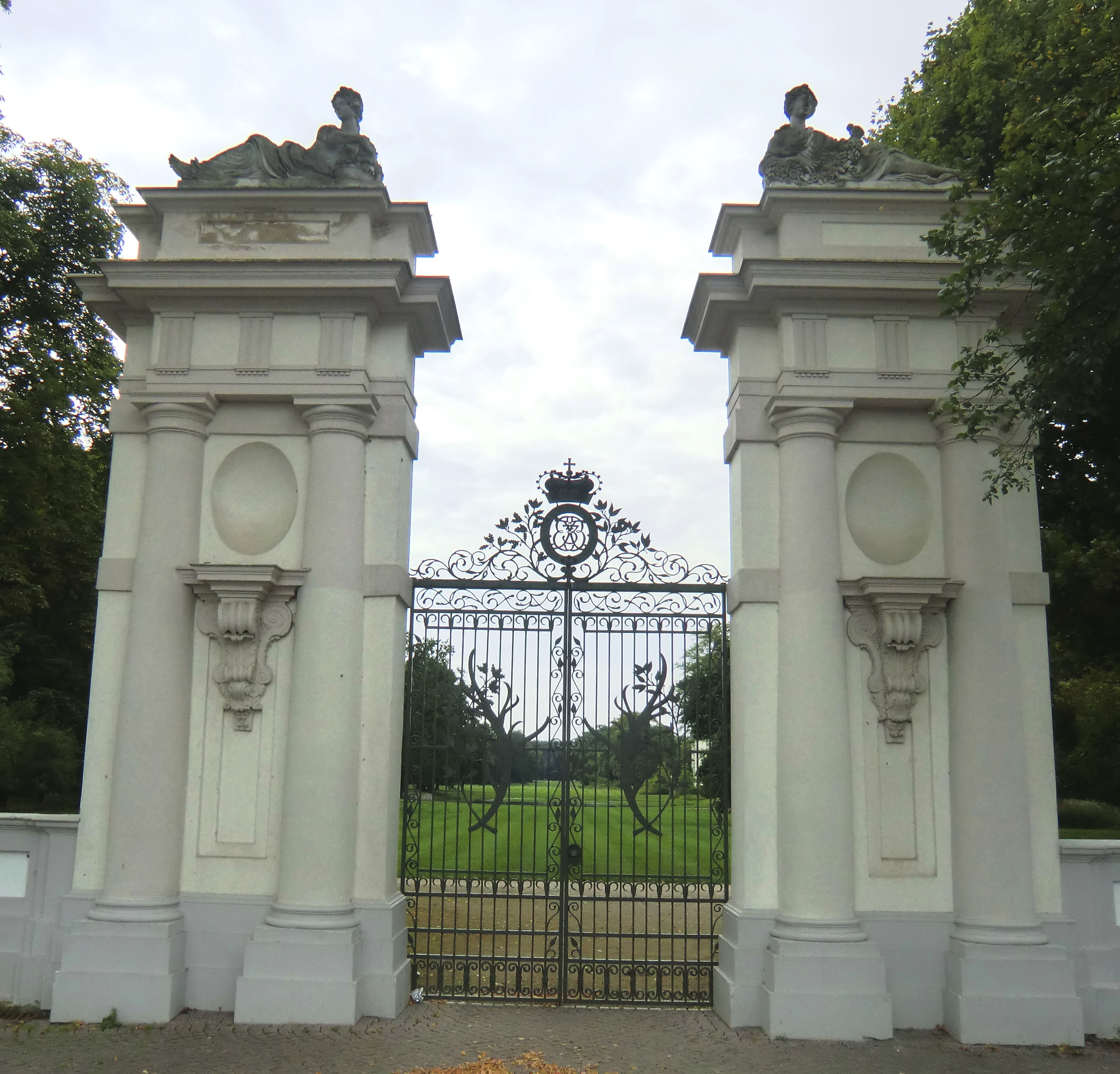 Eingangsportal zum Park des Schlosses Oranienburg. Die Eingangspfeiler mit vorgelegten toskanischen Säulenpaaren werden von den allegorischen Liegefiguren Herbst und Sommer von Jeremias Süssner bekrönt. Das schmiedeeiserne Portal ist mit dem Monogramm des Großen Kurfürsten und dem Kurhut versehen.